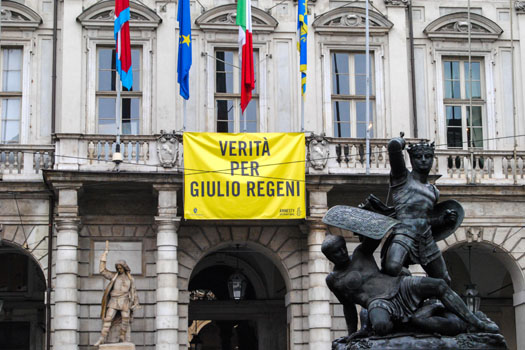 Striscione "Verità per Giulio Regeni" esposto dal 4 aprile 2016 sulla facciata di Palazzo Civico (municipio di Torino)